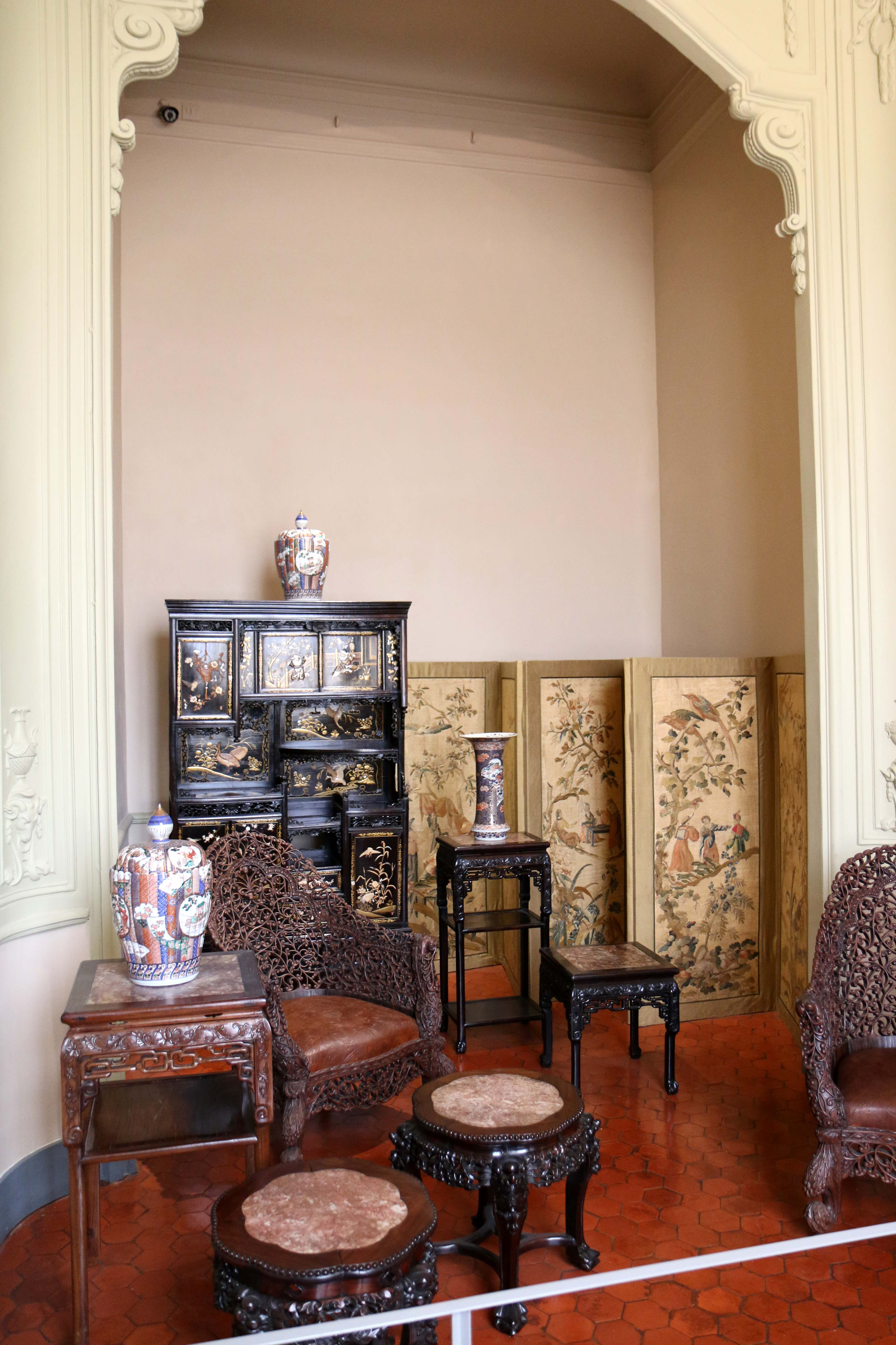 Chambre à alcôve du Musée des Arts décoratifs de la Faïence et de la Mode au château Borély à Marseille.